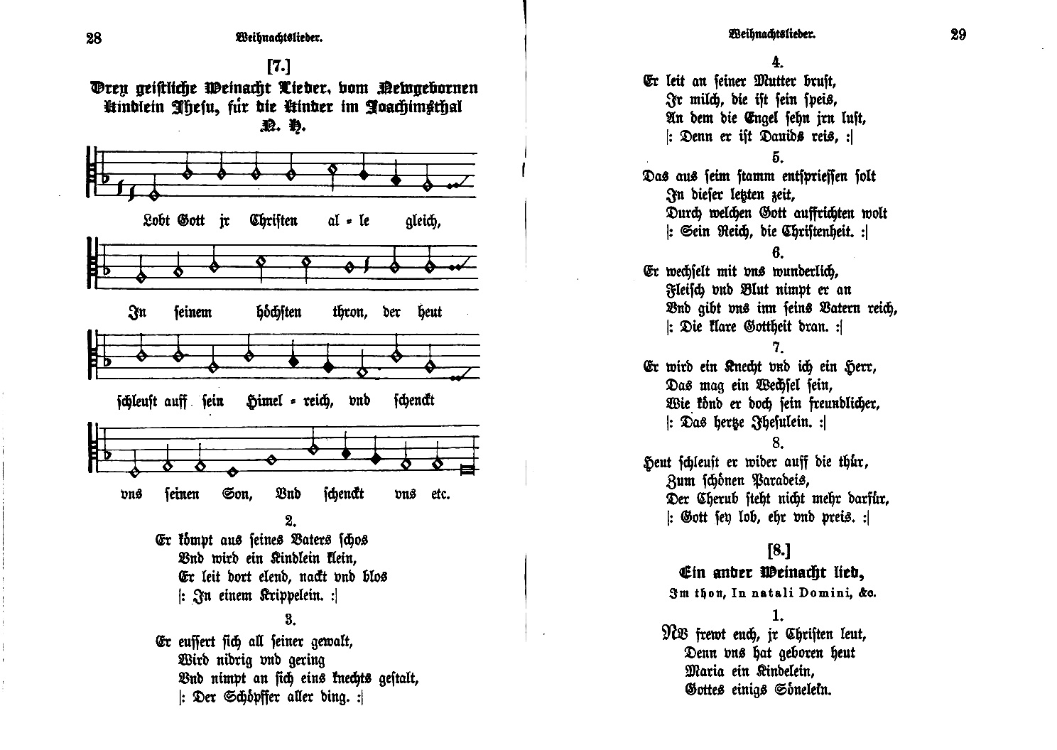 Nicolaus Herman: Lobt Gott, ihr Christen alle gleich, Urtext 1561